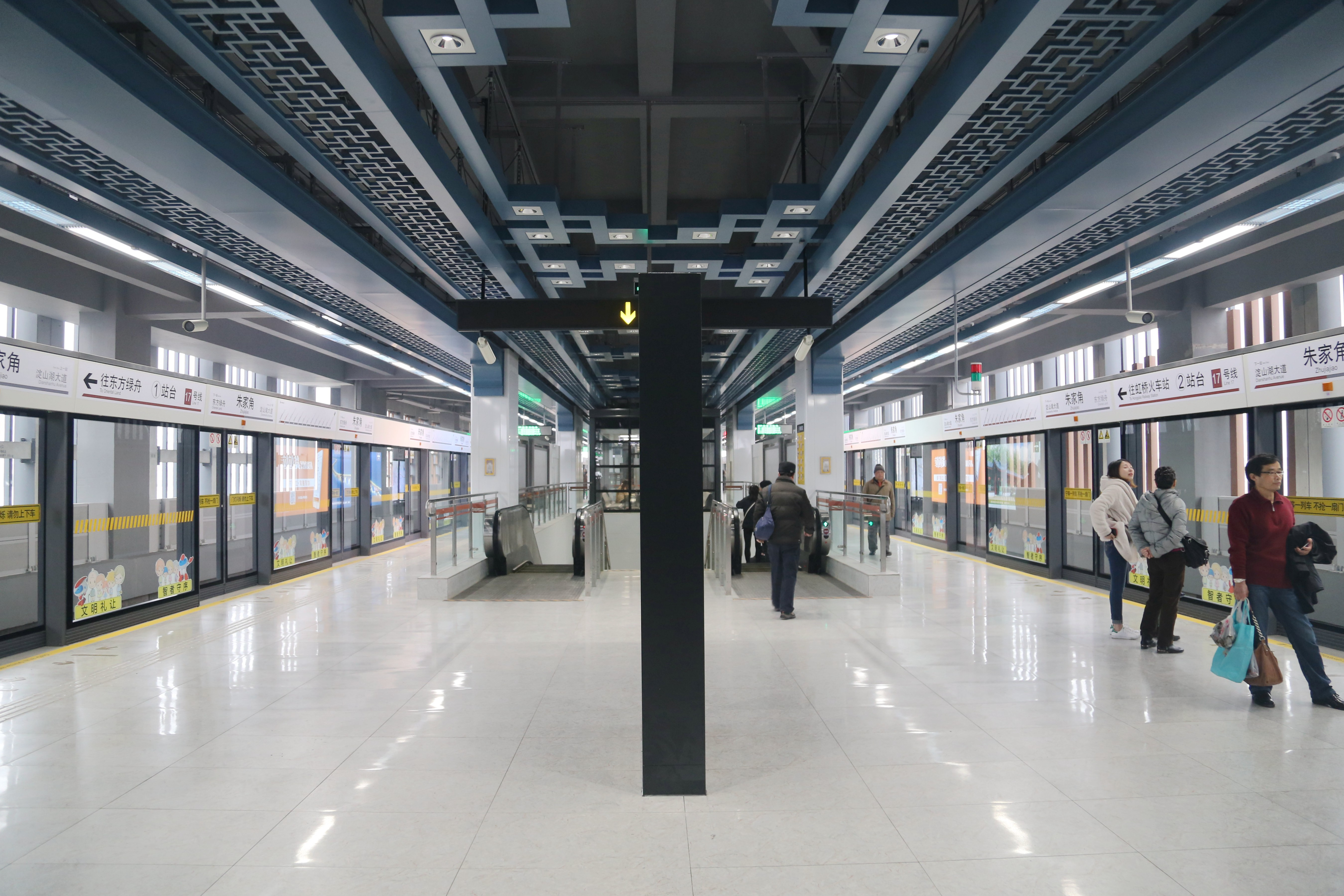 朱家角站站台